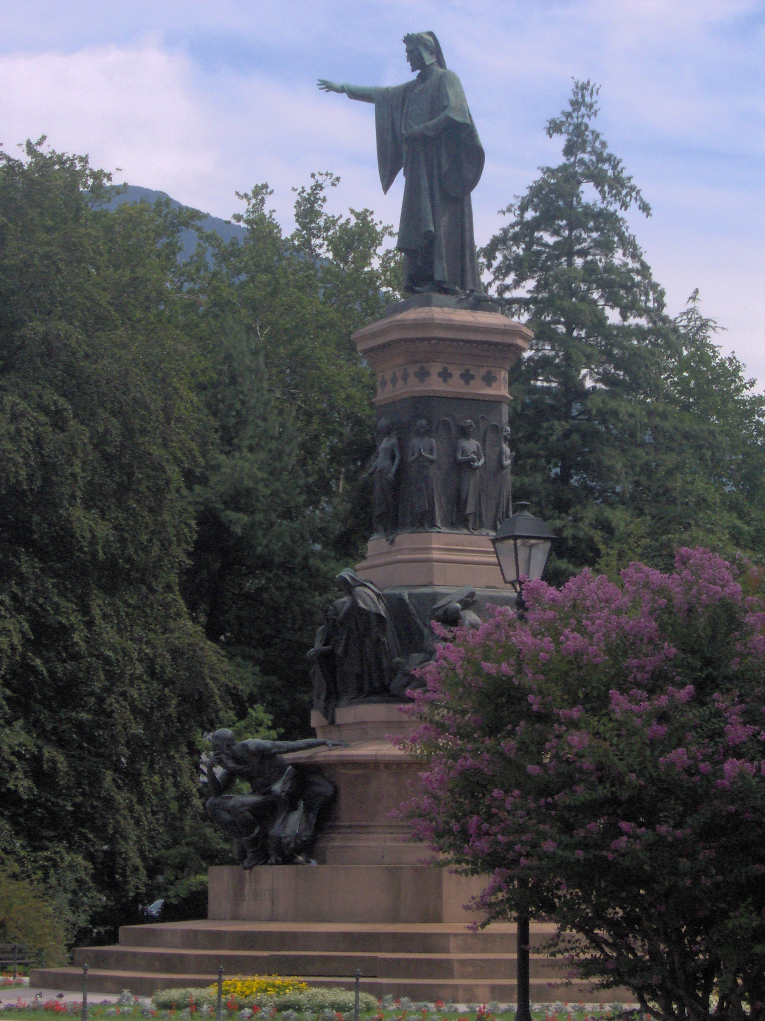 Cesare Zocchi, Monumento a Dante a Trento (1896).